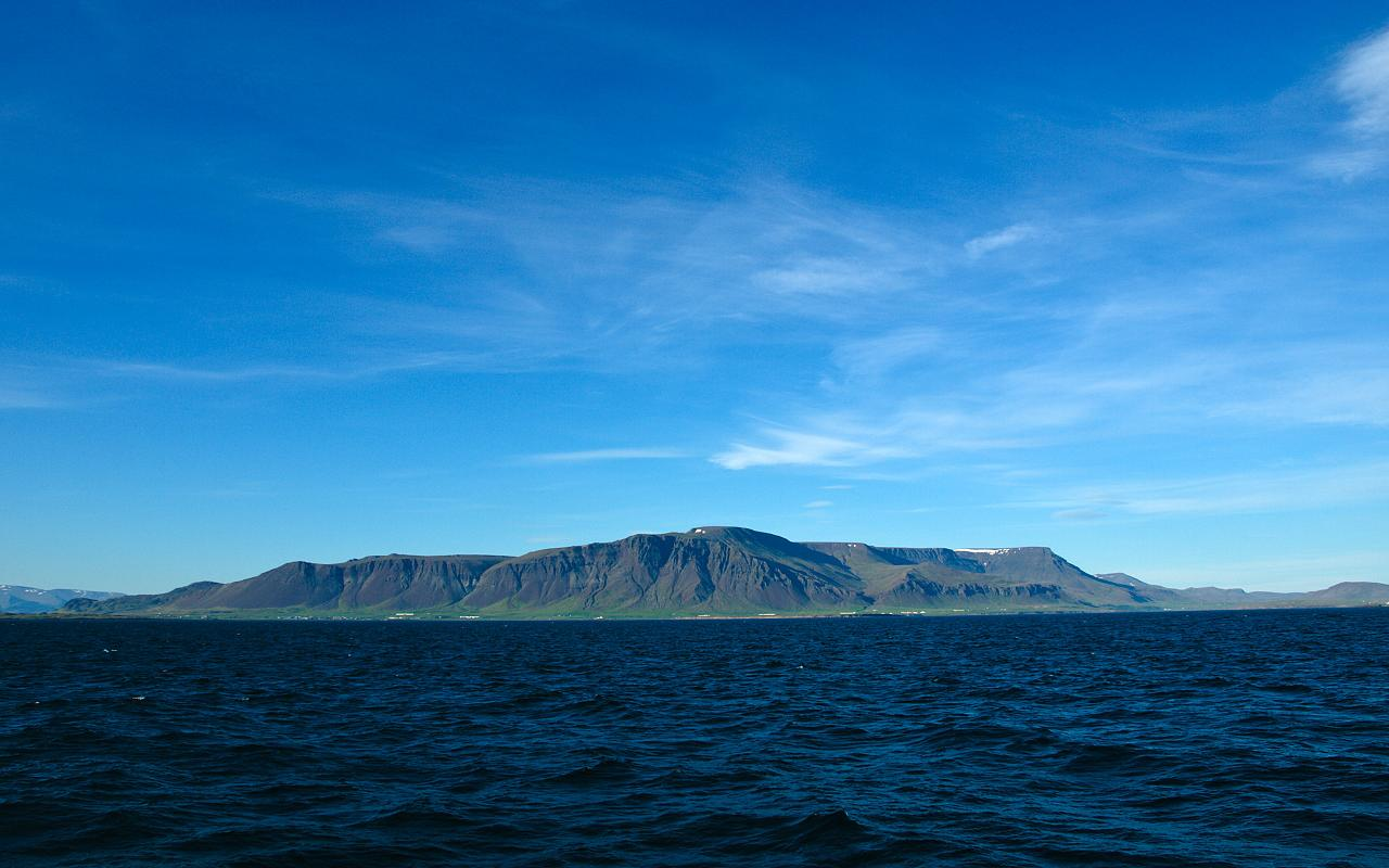 Esja